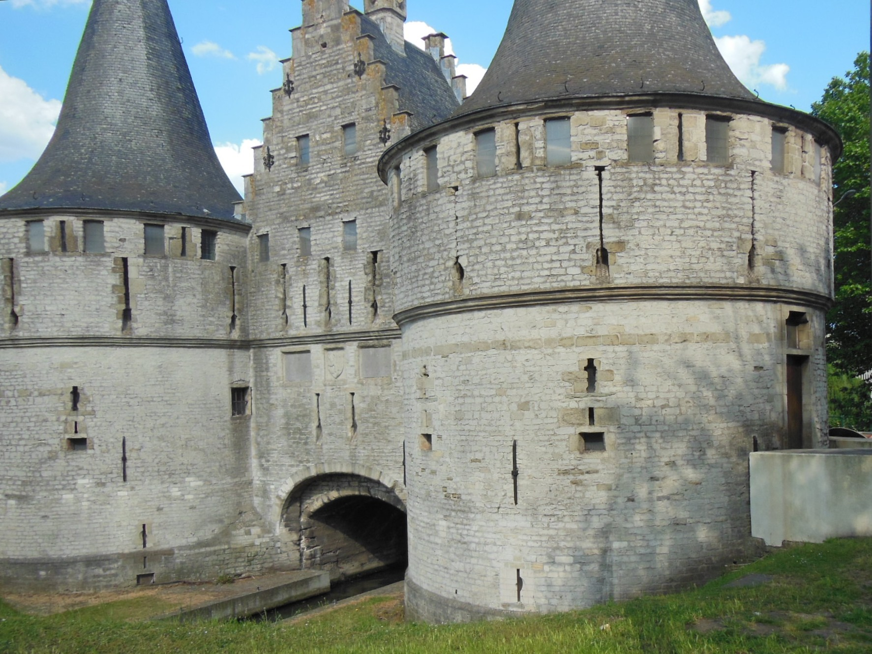 De Westzijde van Het Rabot, met onderaan de doorgang van de doodlopende De Lieve